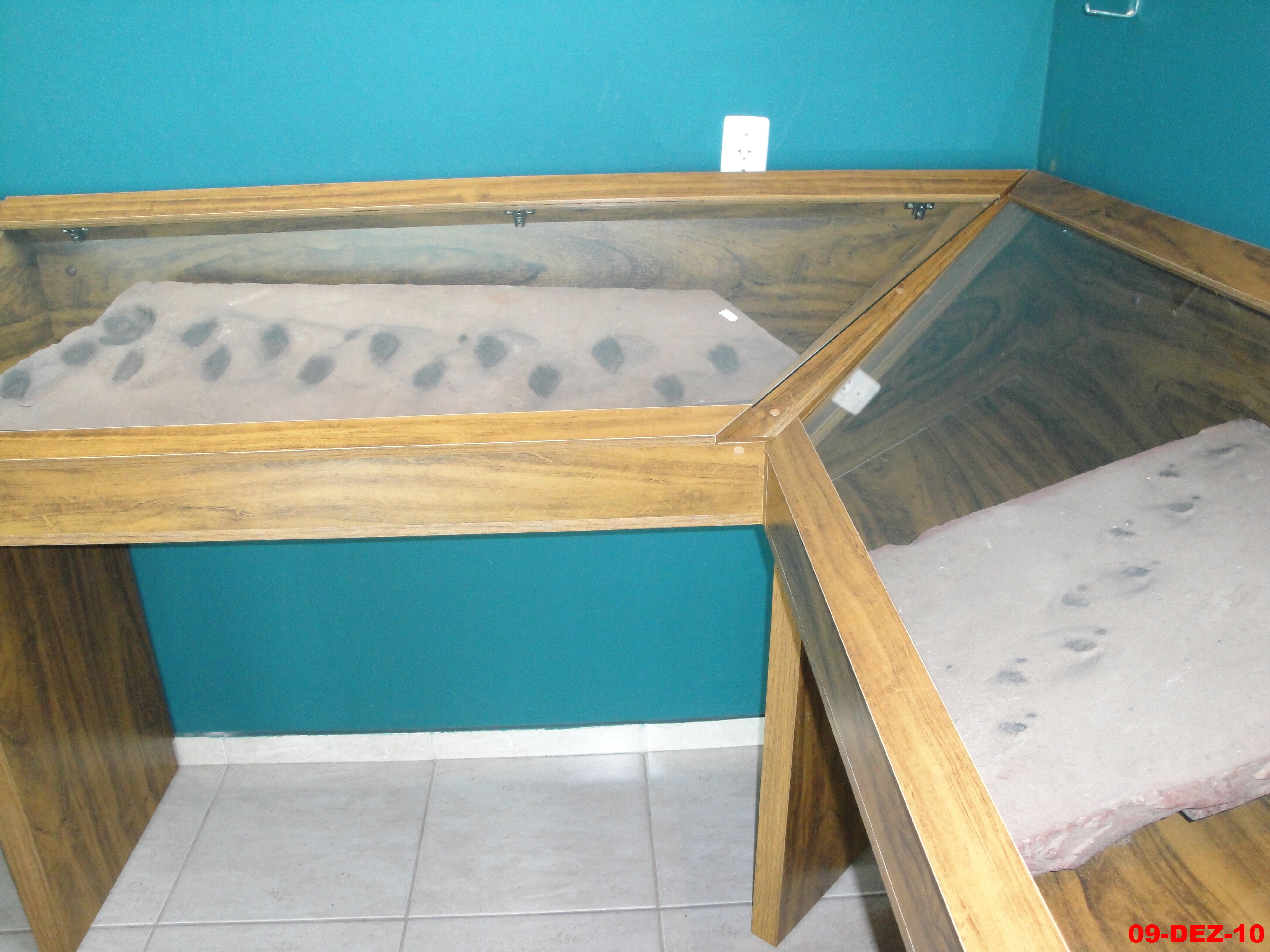 Pegadas de Dinossauros(Icnofósseis) expostos no Museu de Paleontologia e Arqueologia de Araraquara-MAPA